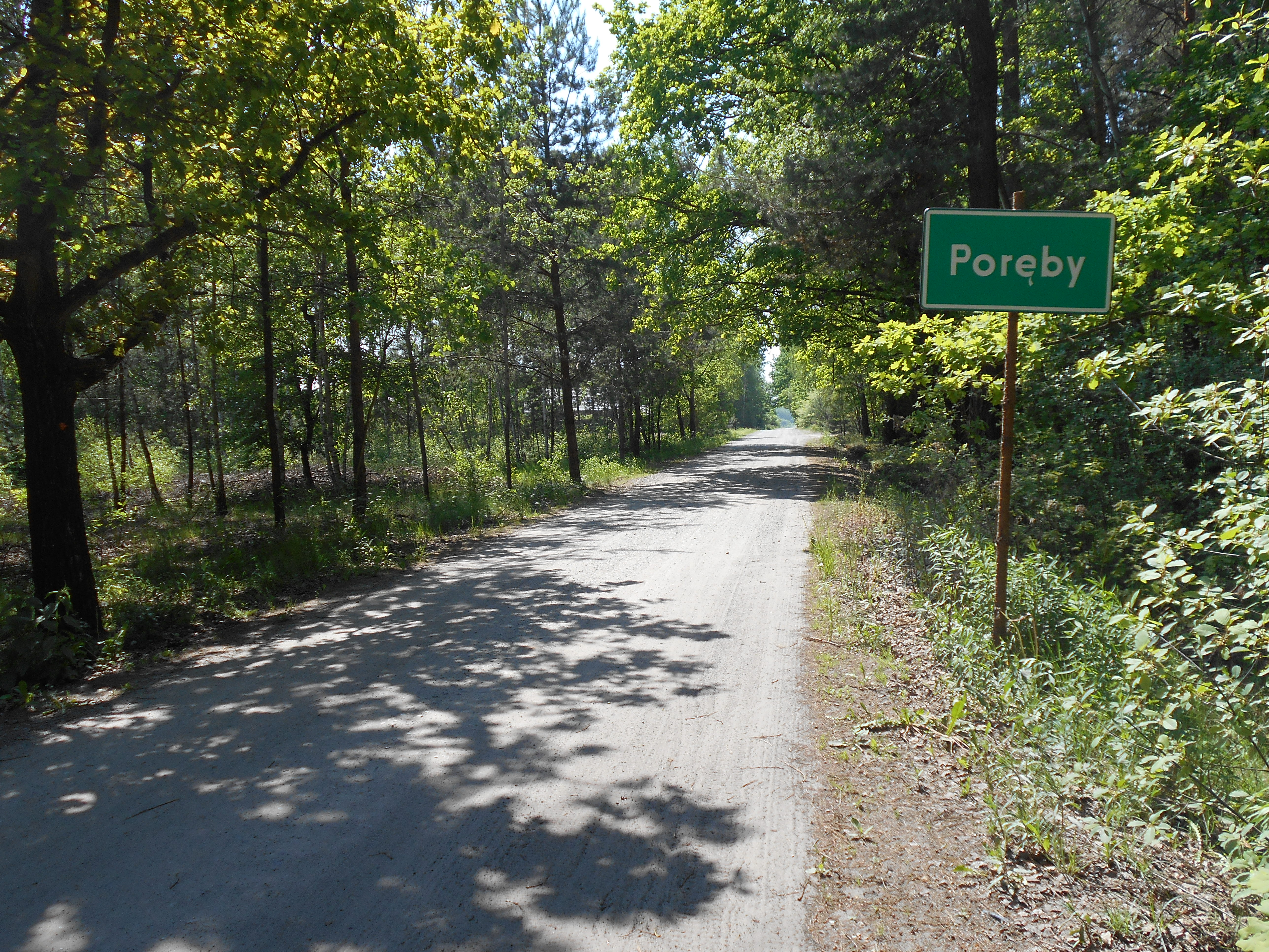 Miejscowość w gminie Dębe Wielkie